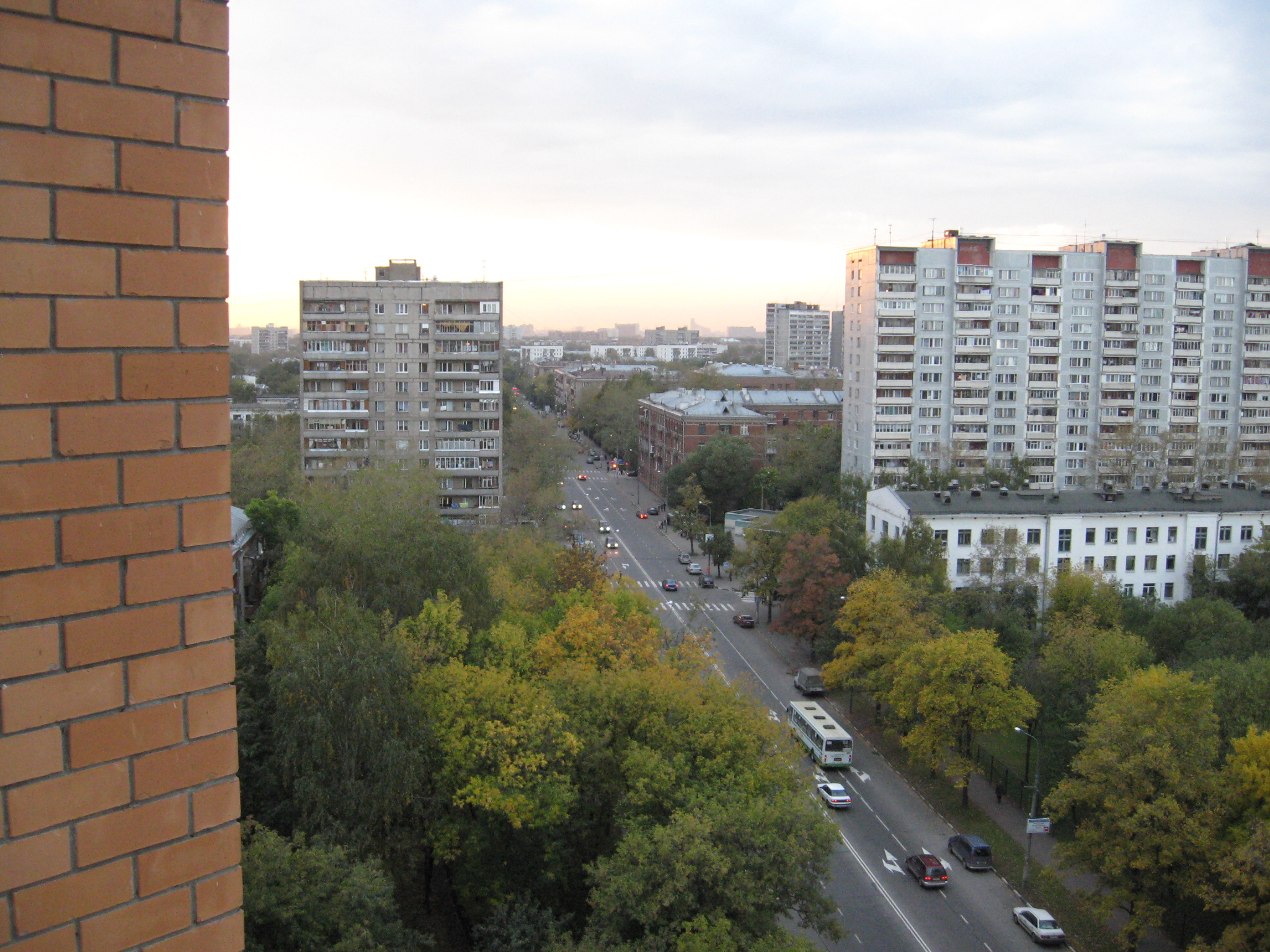 Федеративный проспект 1